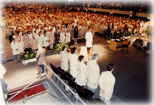 Este evento se realizao en el estadio Obras en Buenos Aires al cumplirse los 80 aniversario de la Escuela Científica Basilio